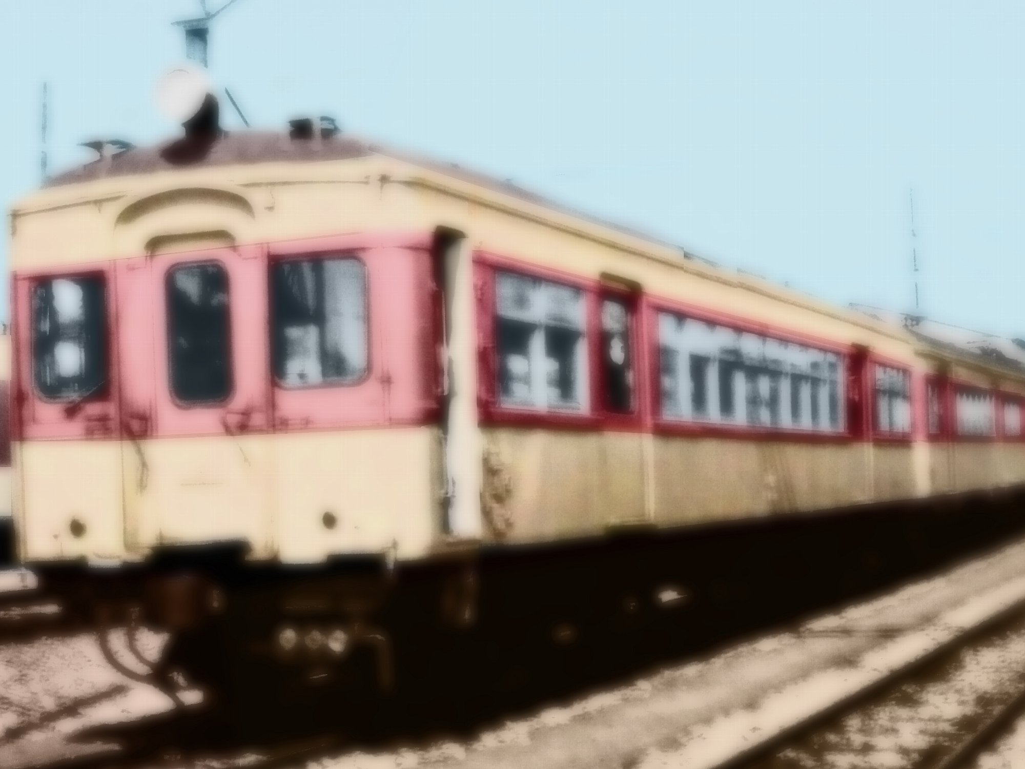 東武野田線・昭和40年代